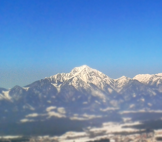 Storžič je vrh v Kamniško-Savinjskih alpah.